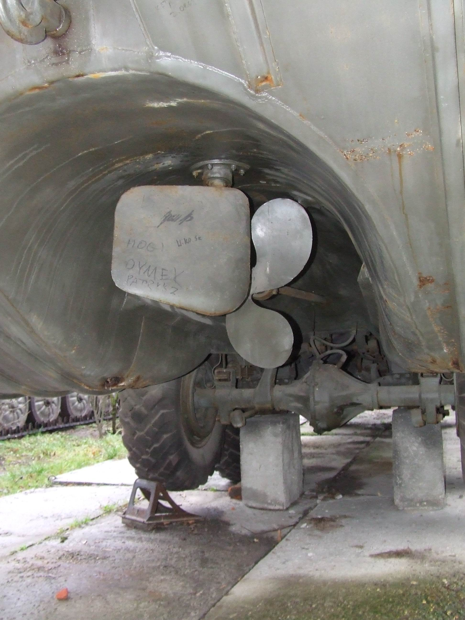 ZiL 485, Muzeum Wojska Polskiego, Warszawa